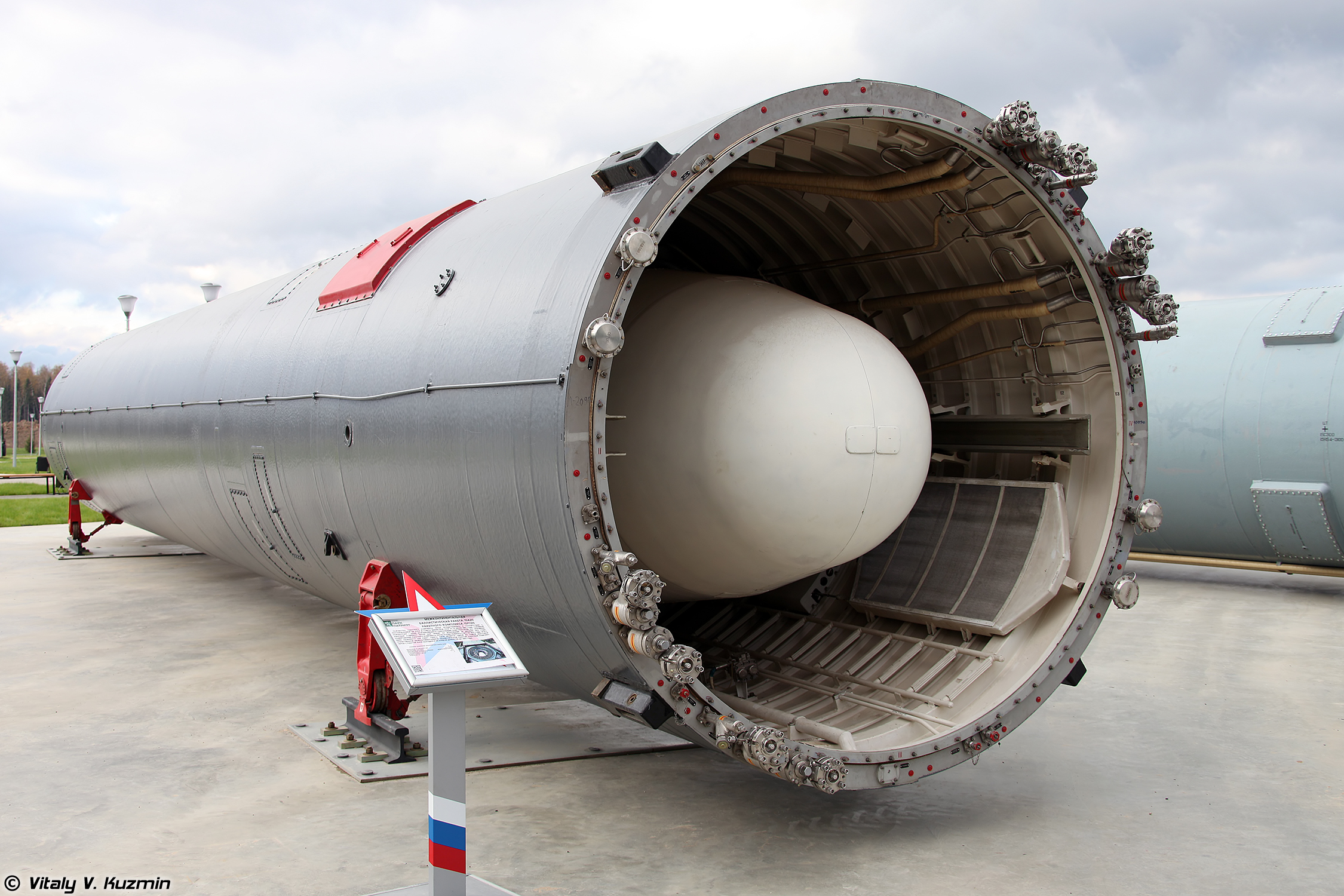 Межконтинентальная баллистическая ракета шахтного базирования 15А20 / УР-100К / РС-10 в транспортно-пусковом контейнере 15Я42